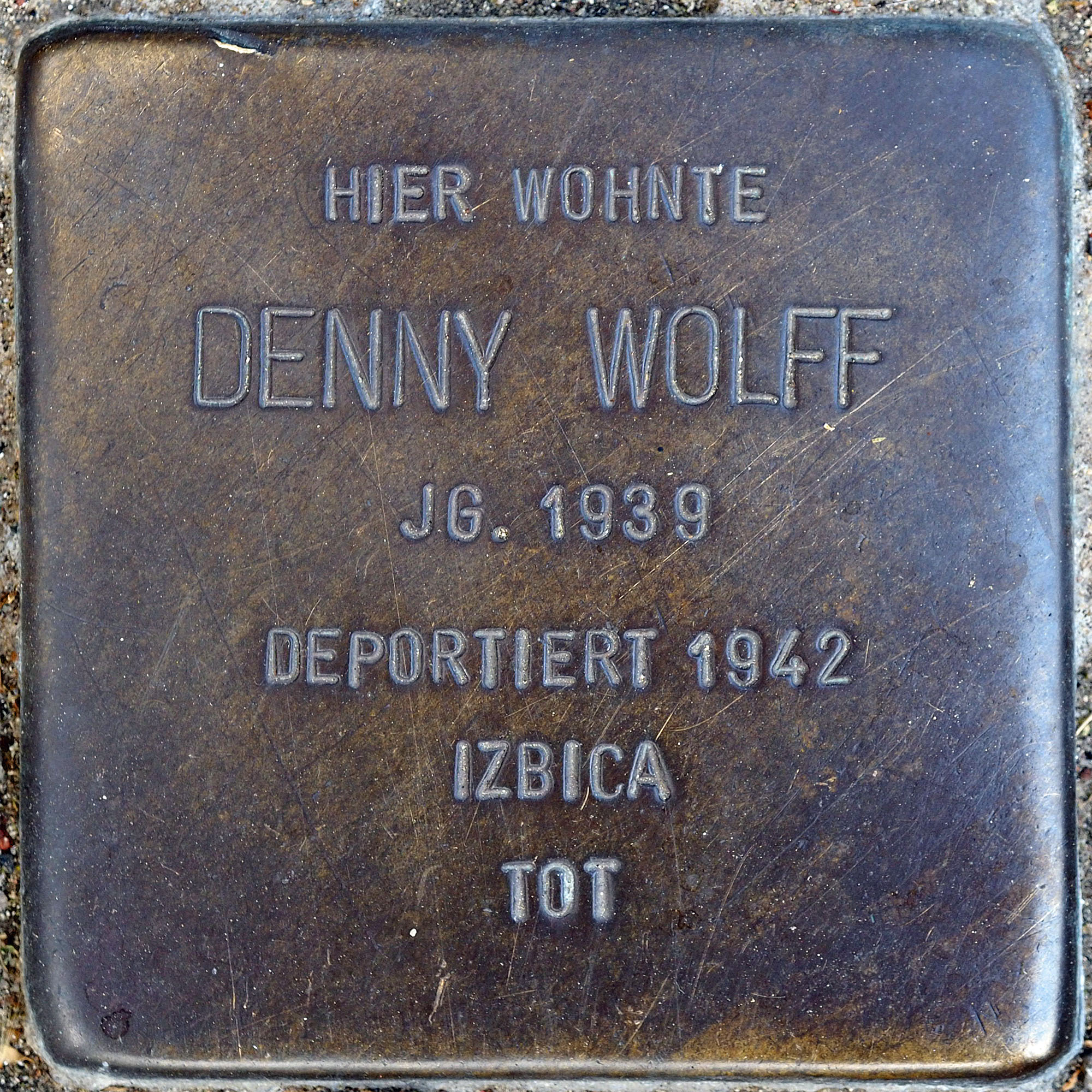 Stolpersteine MG: Wolff, Denny